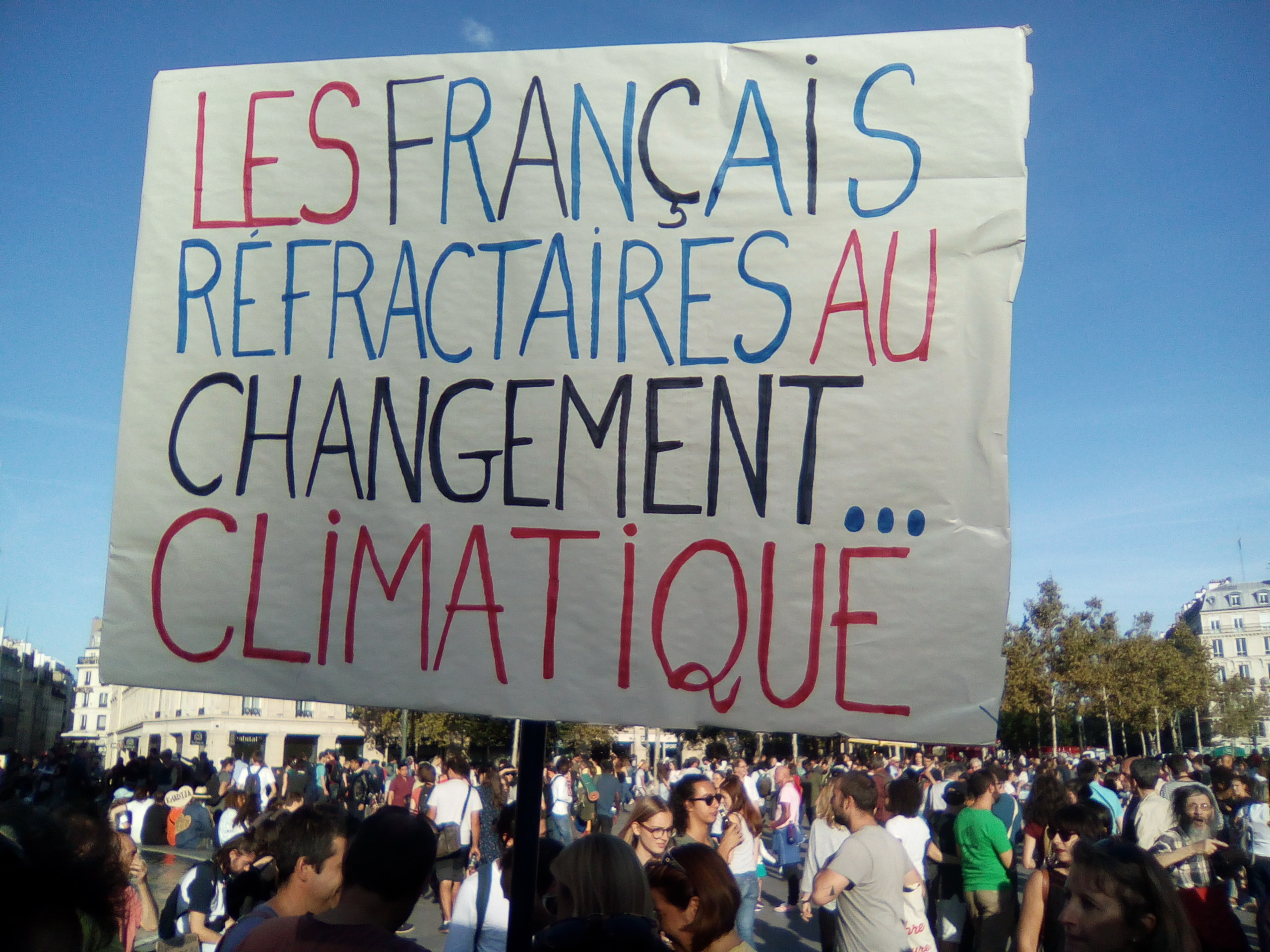 Marche pour le climat à Paris (arrivée place de la République).